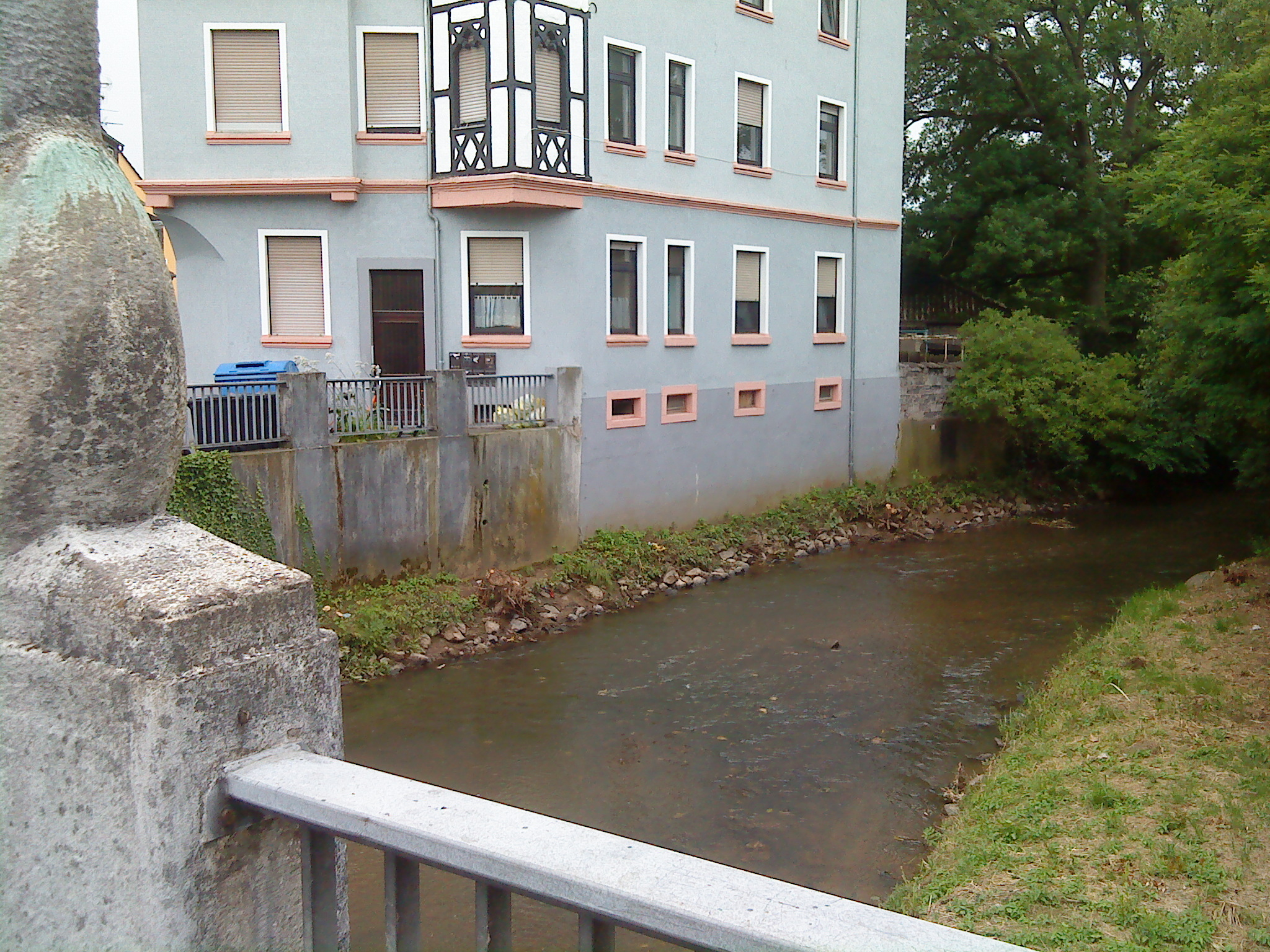 Die Aschaff in Aschaffenburg-Damm